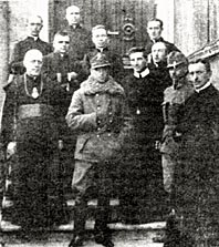 Wilhelm Hapsburg in Ternopil